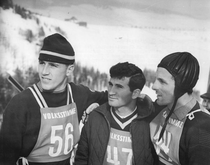 Zentralbild Gahlbeck 25.3.1962 Sprunglauf in Oberwiesenthal Am 25.3.1962 wurde in Oberwiesenthal der Pokal-Sprunglauf der "Volksstimme" Karl-Marx-Stadt ausgetragen. Mit Springern aus 7 Ländern war dieser Spezialsprunglauf auf der fichtelberg-Schanze hervorragned besetzt. UBz: Immer wieder gibt es ein freudiges Wiedersehen. V.l.n.r. Dieter Bokeloh (DDR), Koba Zakadse (SU), und Willy Egger (Österreich).